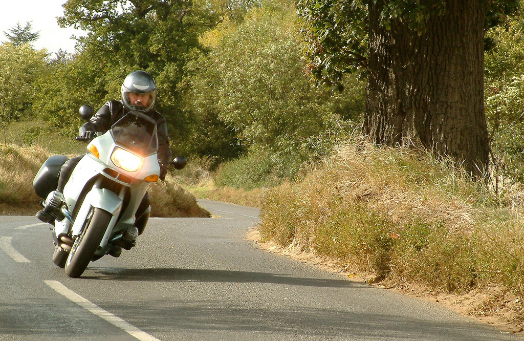 Twisties